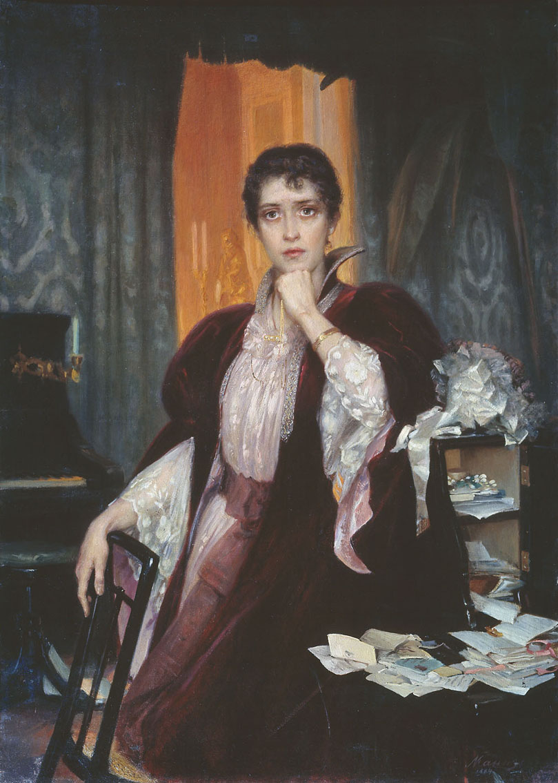 Анна Каренина